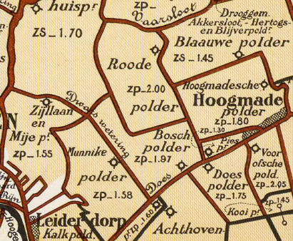 Boschpolder